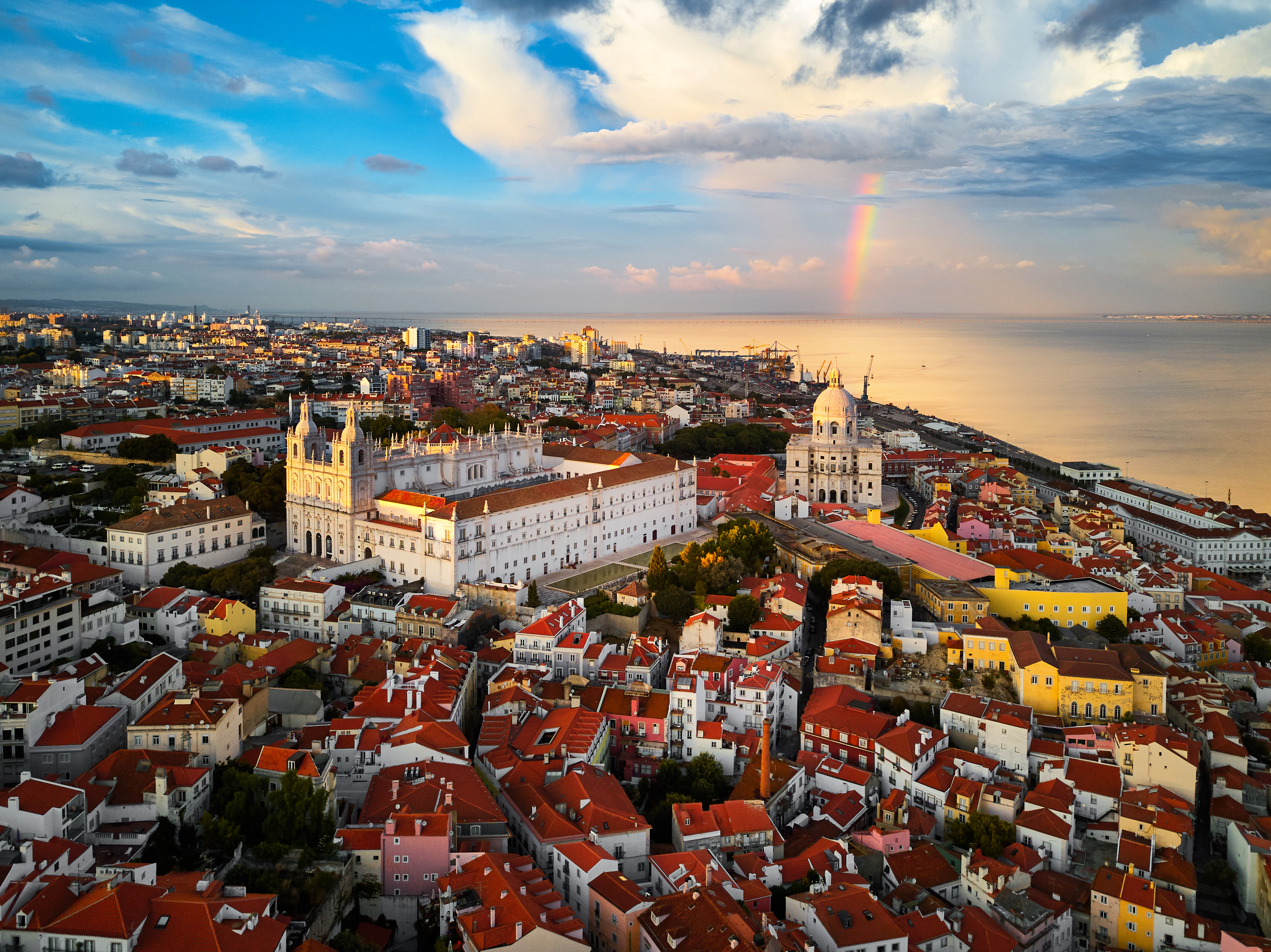 Lisbon